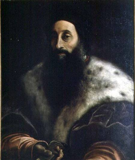 Sebastiano del Piombo - Portrait de Baccio Valori- lorence, Palazzo Pitti